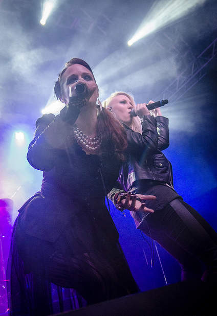 A Banda de Metal Sinfônico Therion apresenta-se em São Paulo, Brasil.